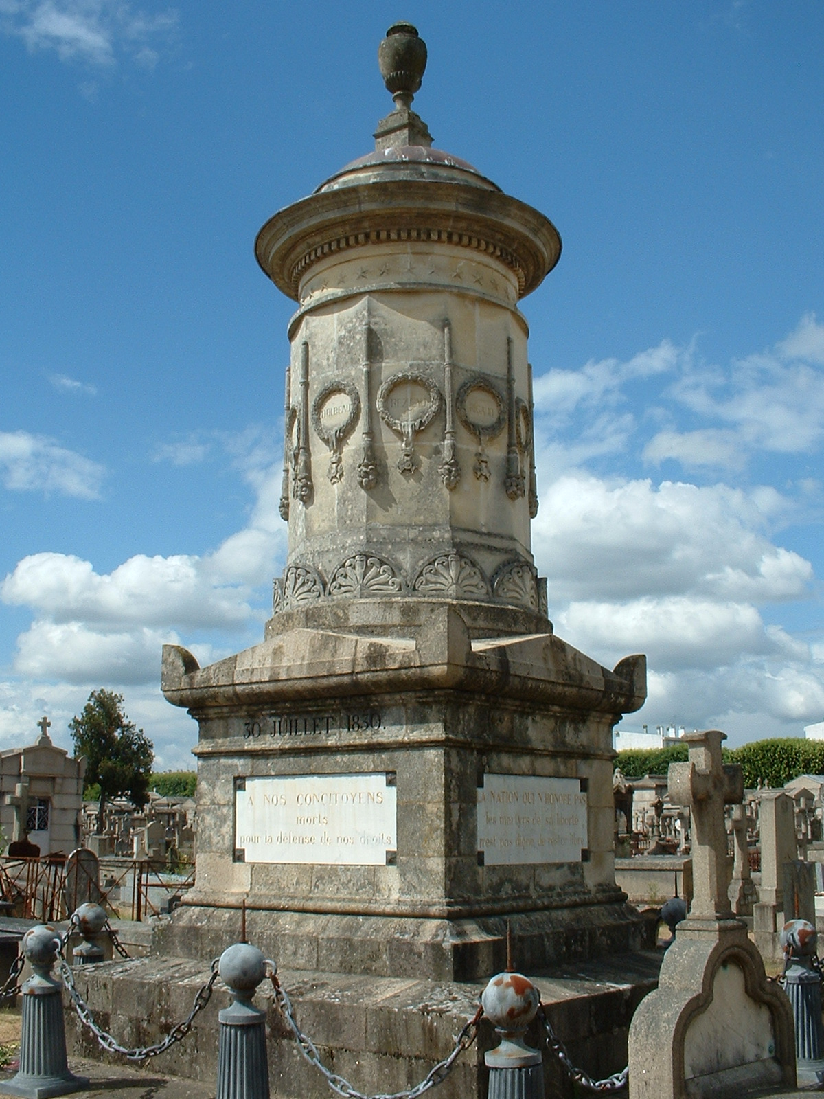 Nantes (France) - Cimetière Miséricorde - Monuments aux morts de 1830